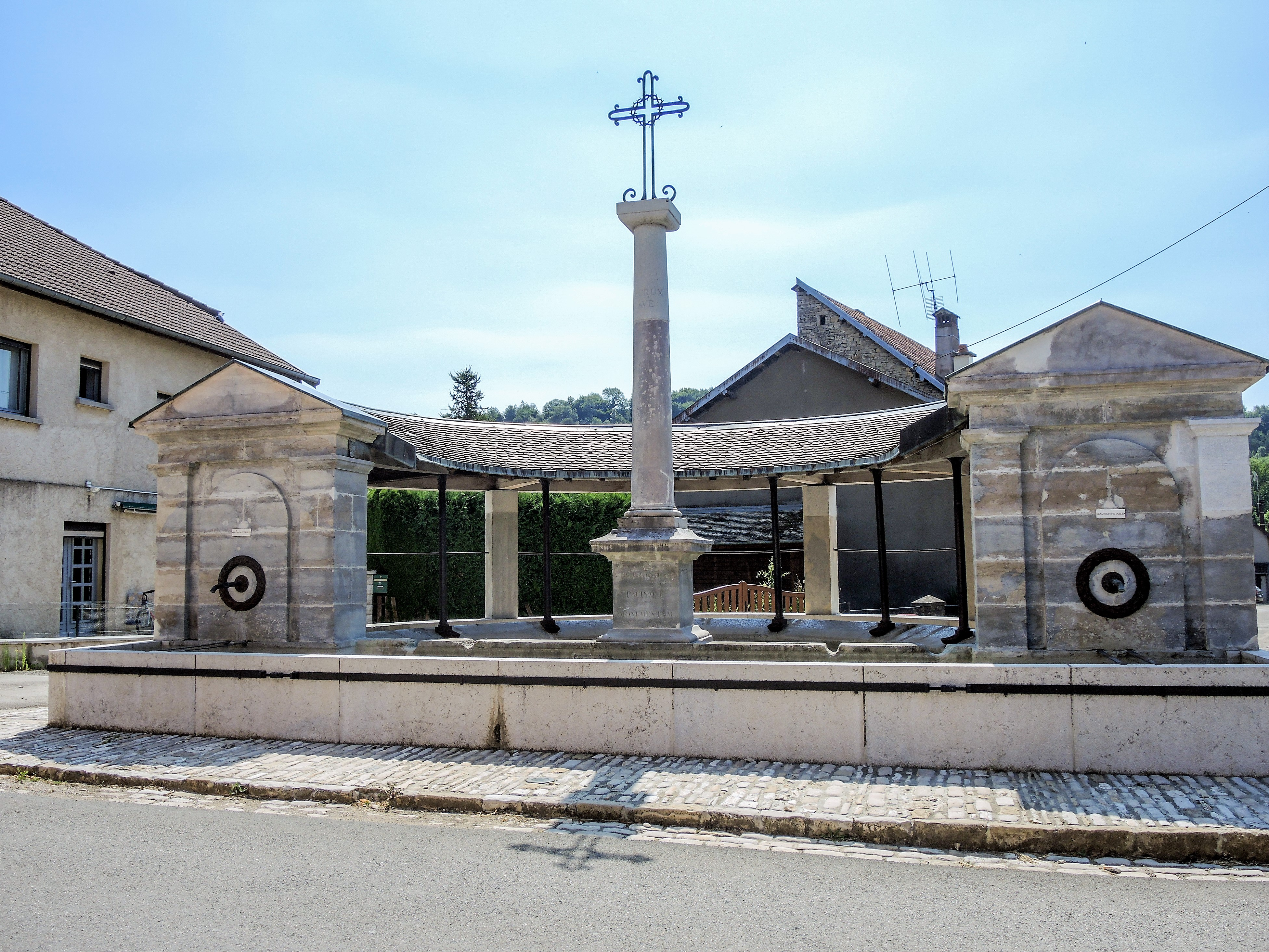 Fontaine-lavoir de Maximien Painchaux. Epeugney. Doubs